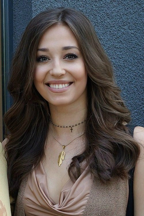 Izabella Krzan, modelka i prezenterka telewizyjna.